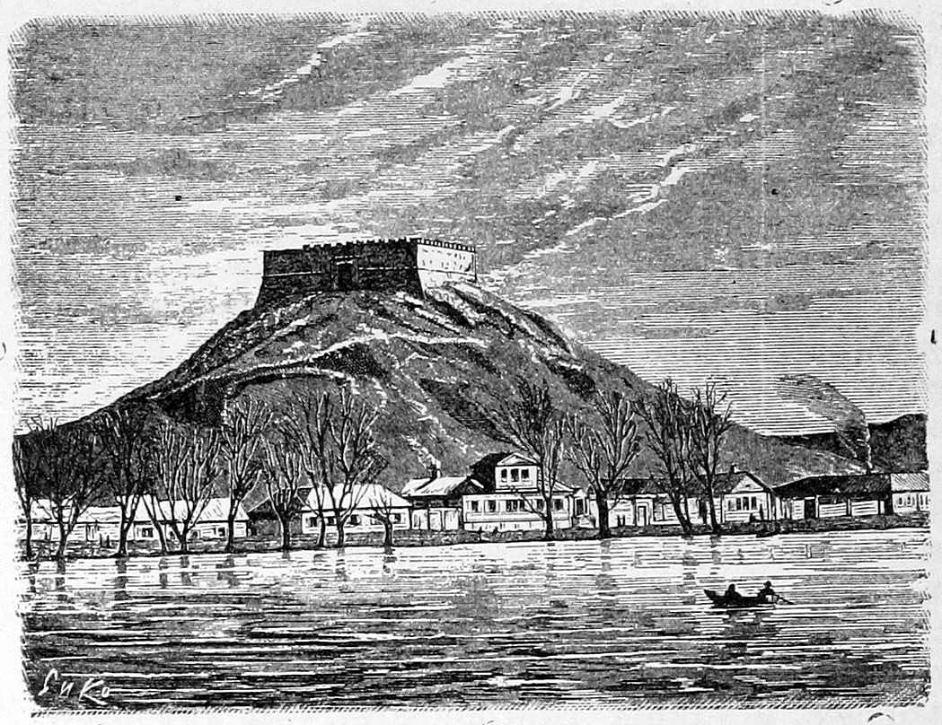 Гипсовая гора в Илецкой Защите. Это изображение было использовано для иллюстрирования статьи «Илецкие казаки» опубликованной в десятом томе «Военной энциклопедии», который был издан книгоиздательским товариществом И. Д. Сытина в 1912—1913 гг. в столице Российской империи городе Санкт-Петербурге.